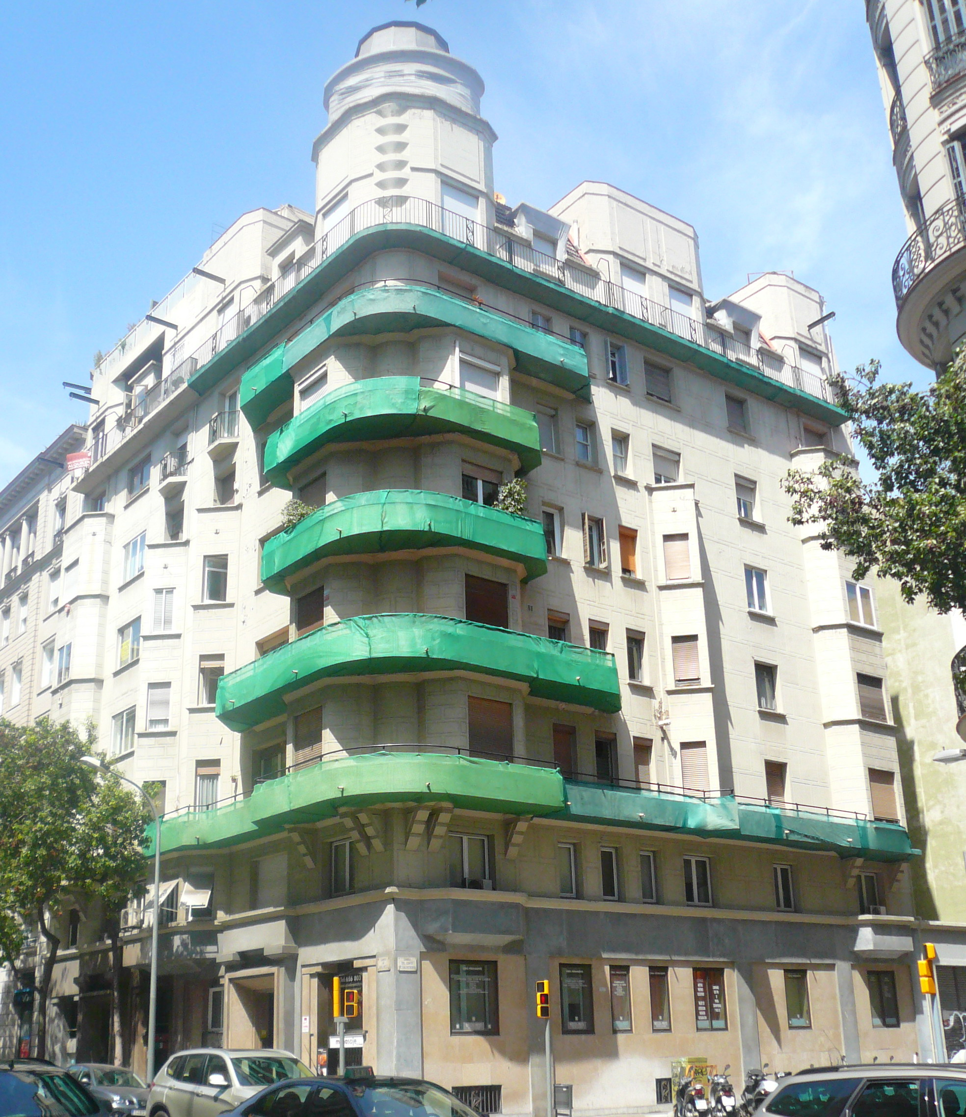 Edifici Mariano Pidelaserra (Barcelona)